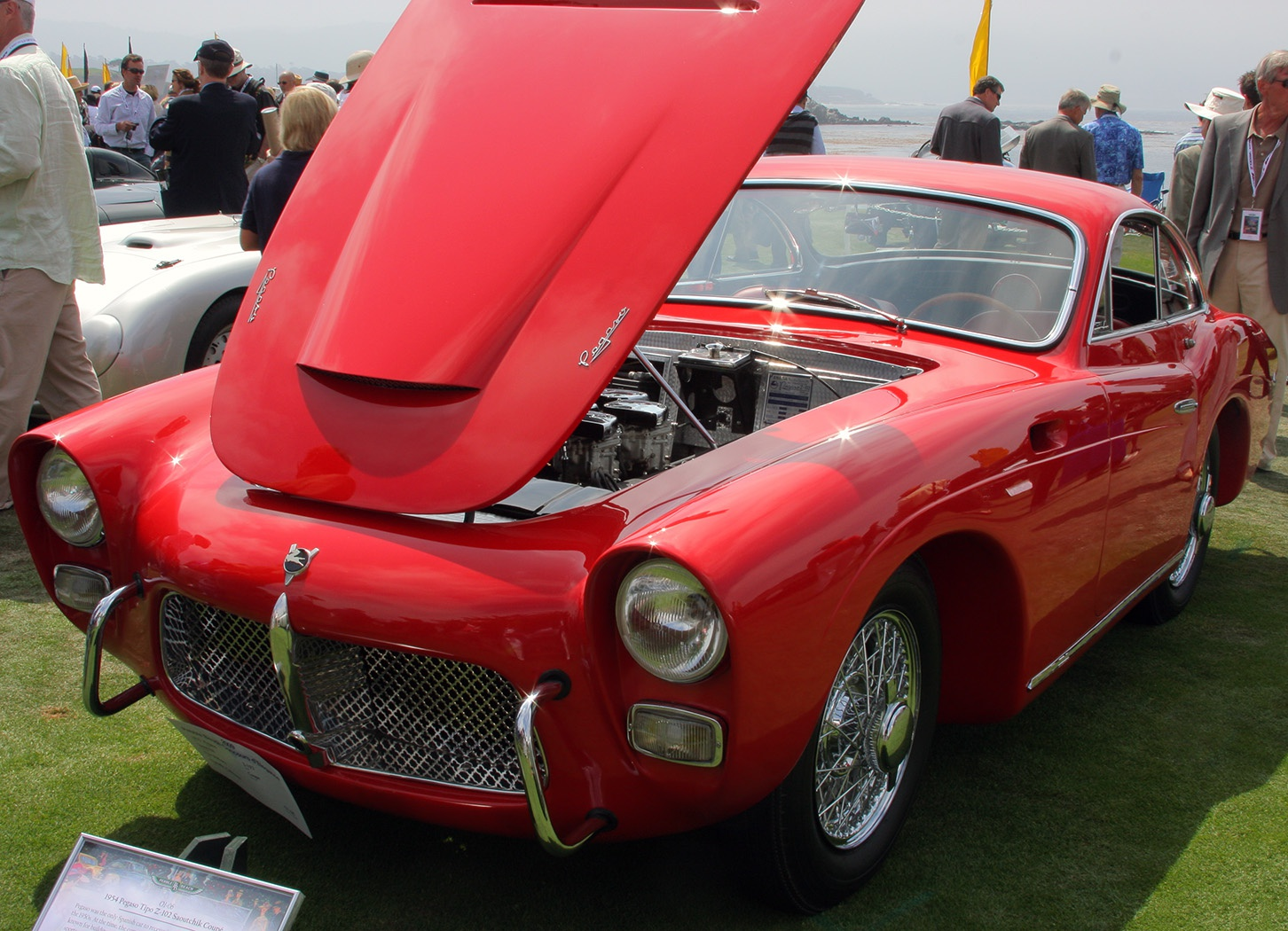 Capó abierto de un Z-102 Saoutchik